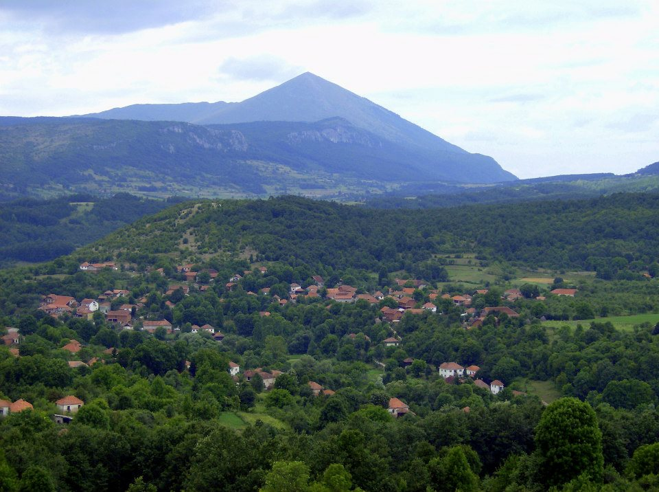 Panorama Rujišta sa planinom Rtanj u pozadini;sa jugoistočne strane.--NemanjaBoljevac (разговор) 16:43, 20. фебруар 2013. (CET)